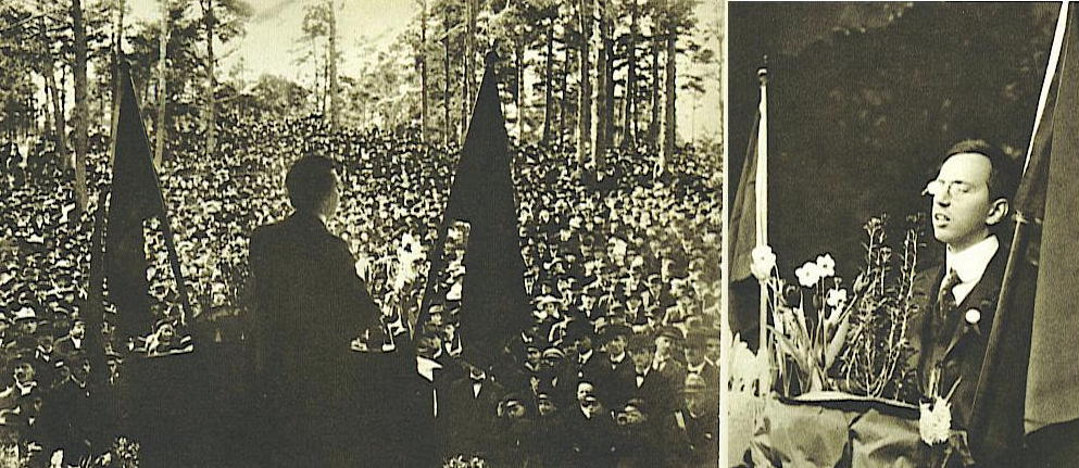 Zeth Höglund speaks 1917